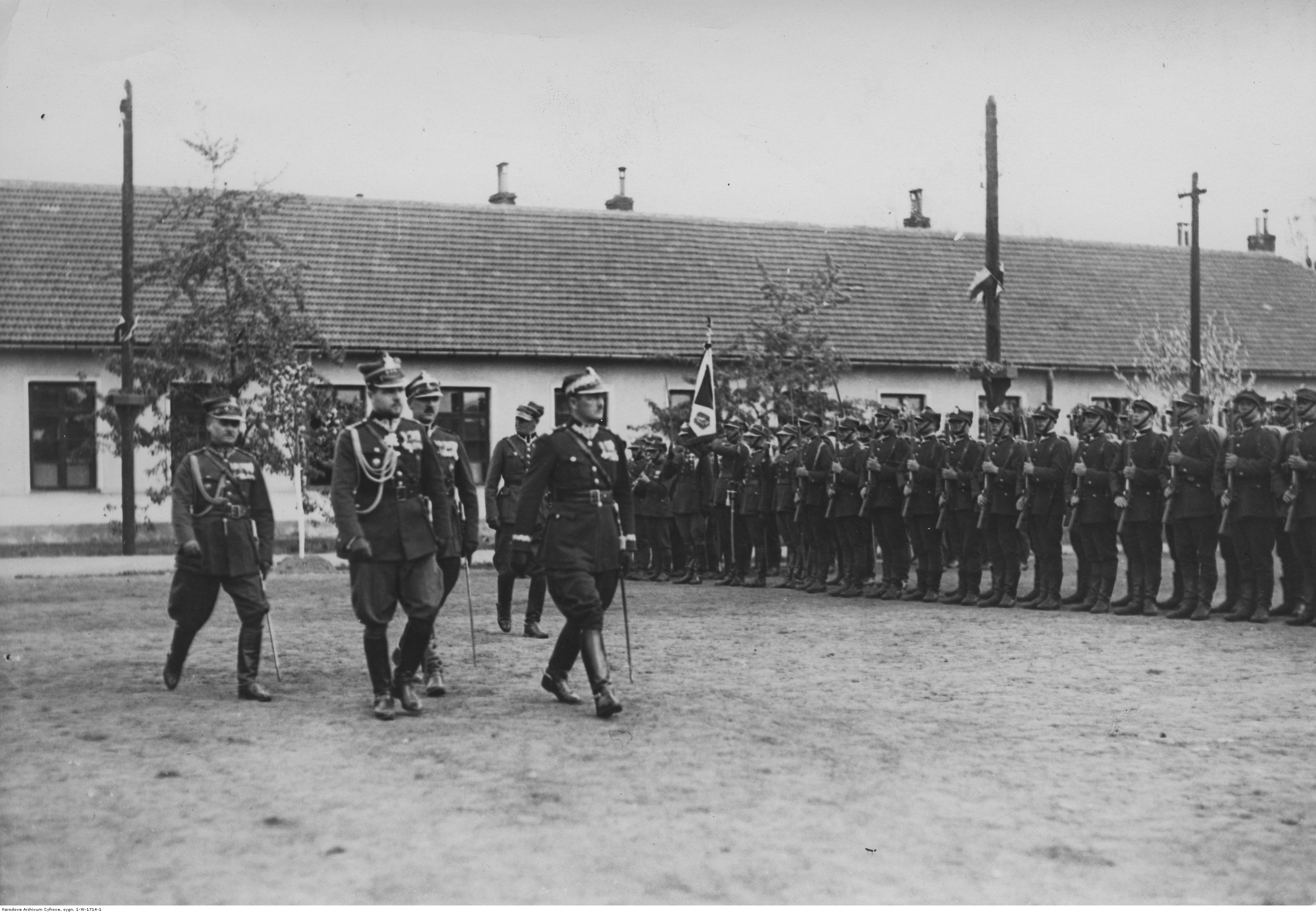 Święto 5 Batalionu Saperów w Krakowie; maj 1929. Gen. Mieczysław Smorawiński (na pierwszym planie) i płk Marian Bolesławicz (na lewo od gen. Smorawińskiego) w otoczeniu nierozpoznanych oficerów przed frontem kompanii honorowej. Koncern Ilustrowany Kurier Codzienny - Archiwum Ilustracji. Sygnatura: 1-W-1714-1